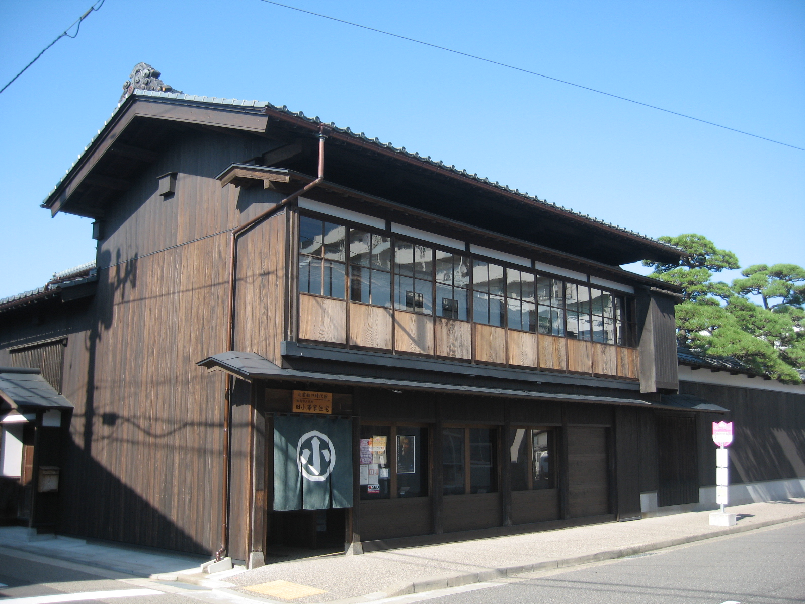 新潟県新潟市中央区。旧小沢家住宅の画像。